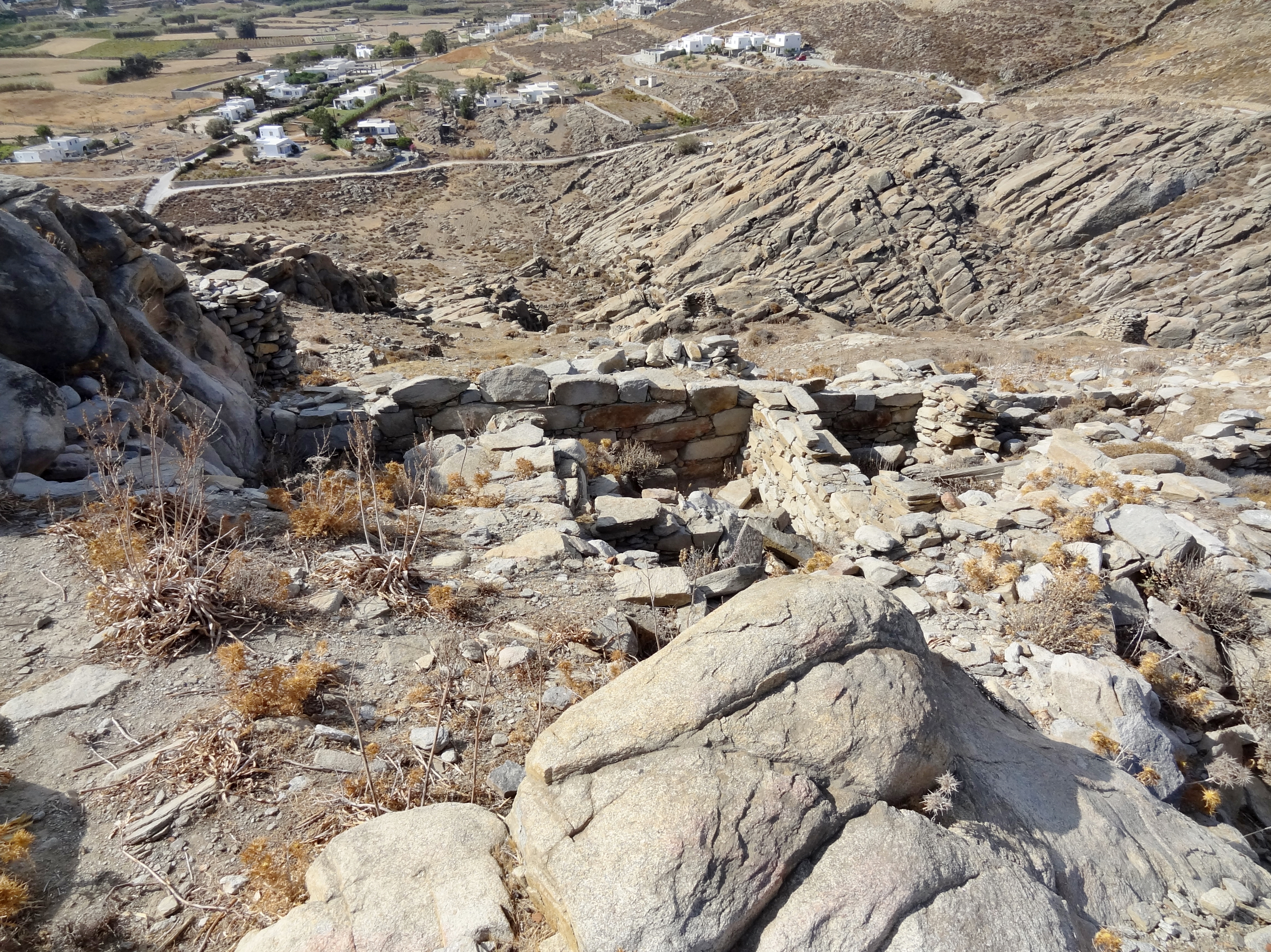 Mykenischen Akropolis von Koukounaries bei Naousa auf Paros, Kykladen, Griechenland